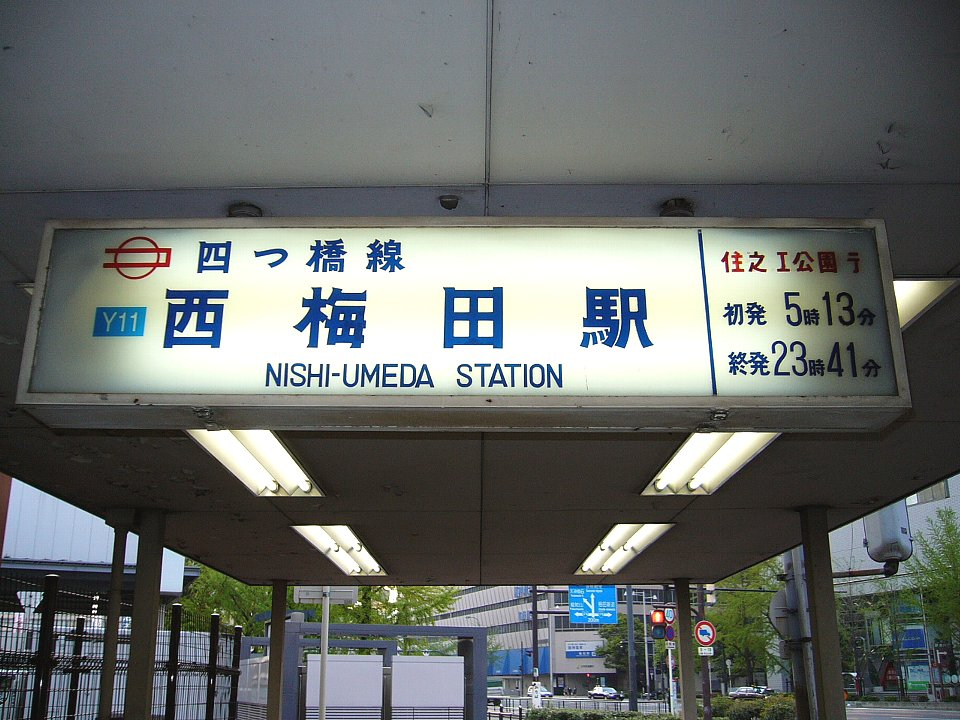 西梅田駅出入口 地下鉄案内が古い書体となっている